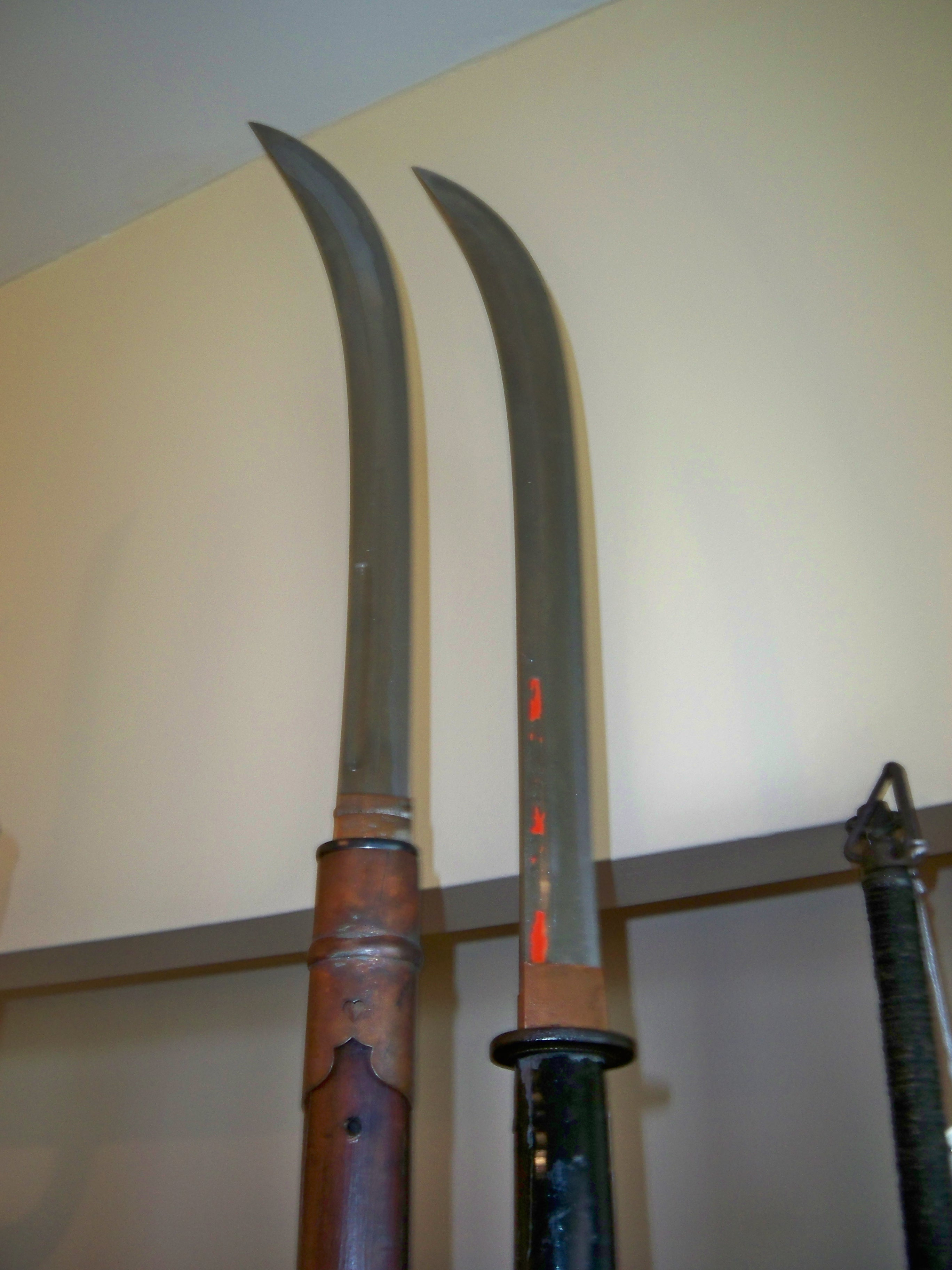 japanese (samurai)Edo period naginata